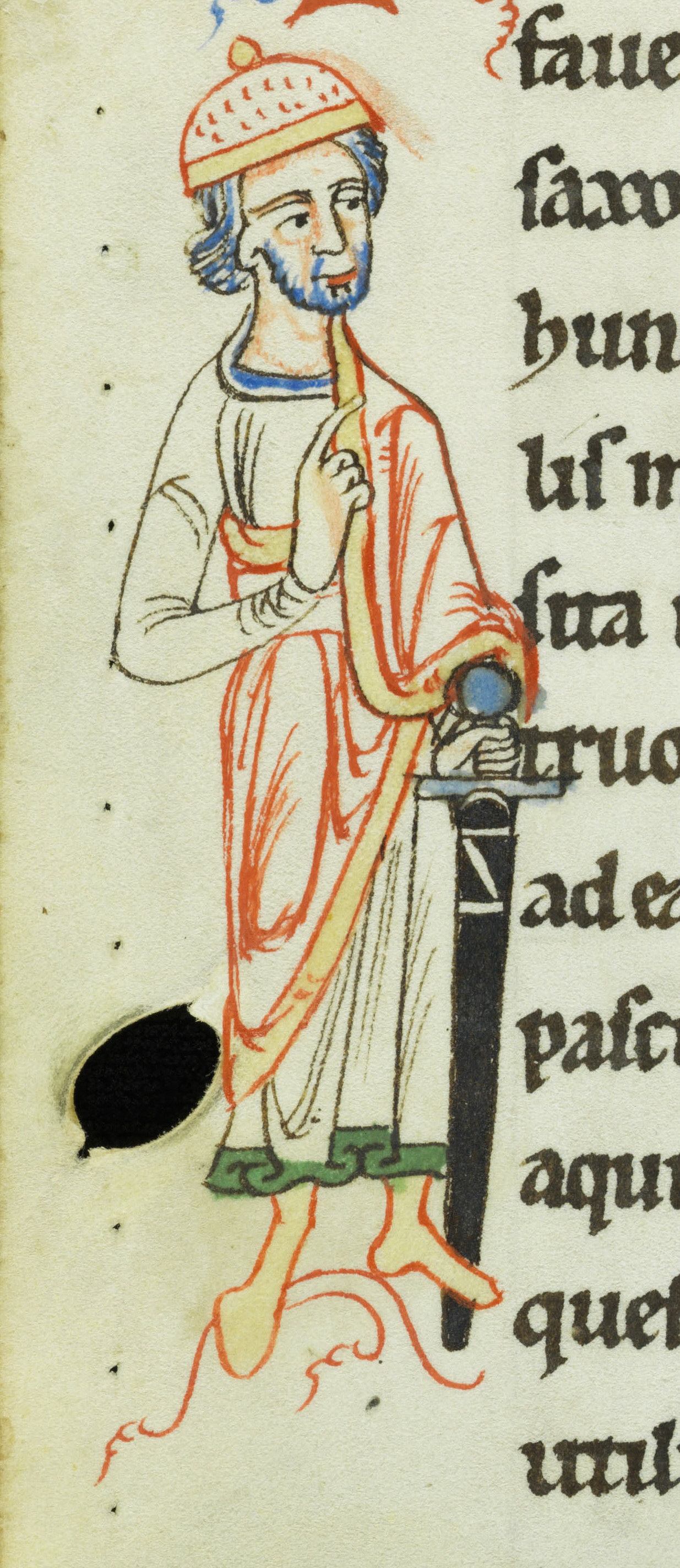 Acta Sancti Petri in Augia; St. Gallen, Kantonsbibliothek, Vadianische Sammlung, VadSlg Ms. 321, S. 48, Herzog Heinrich der Löwe